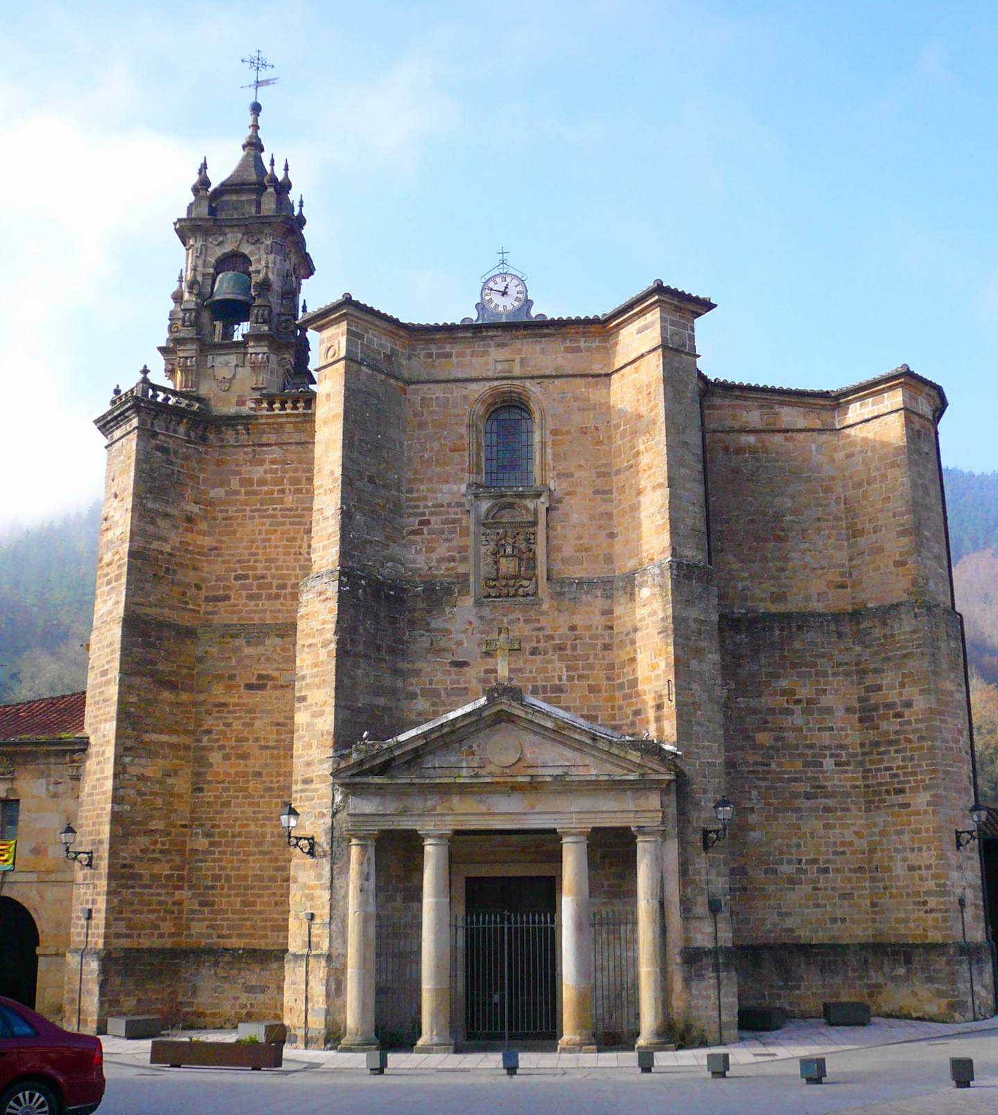 Iglesia de San Martín, Ataun (Guipúzcoa)